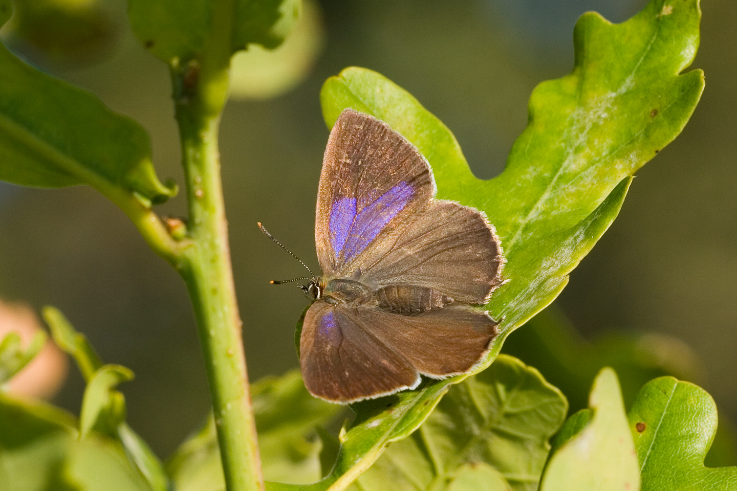 Neozephyrus quercus